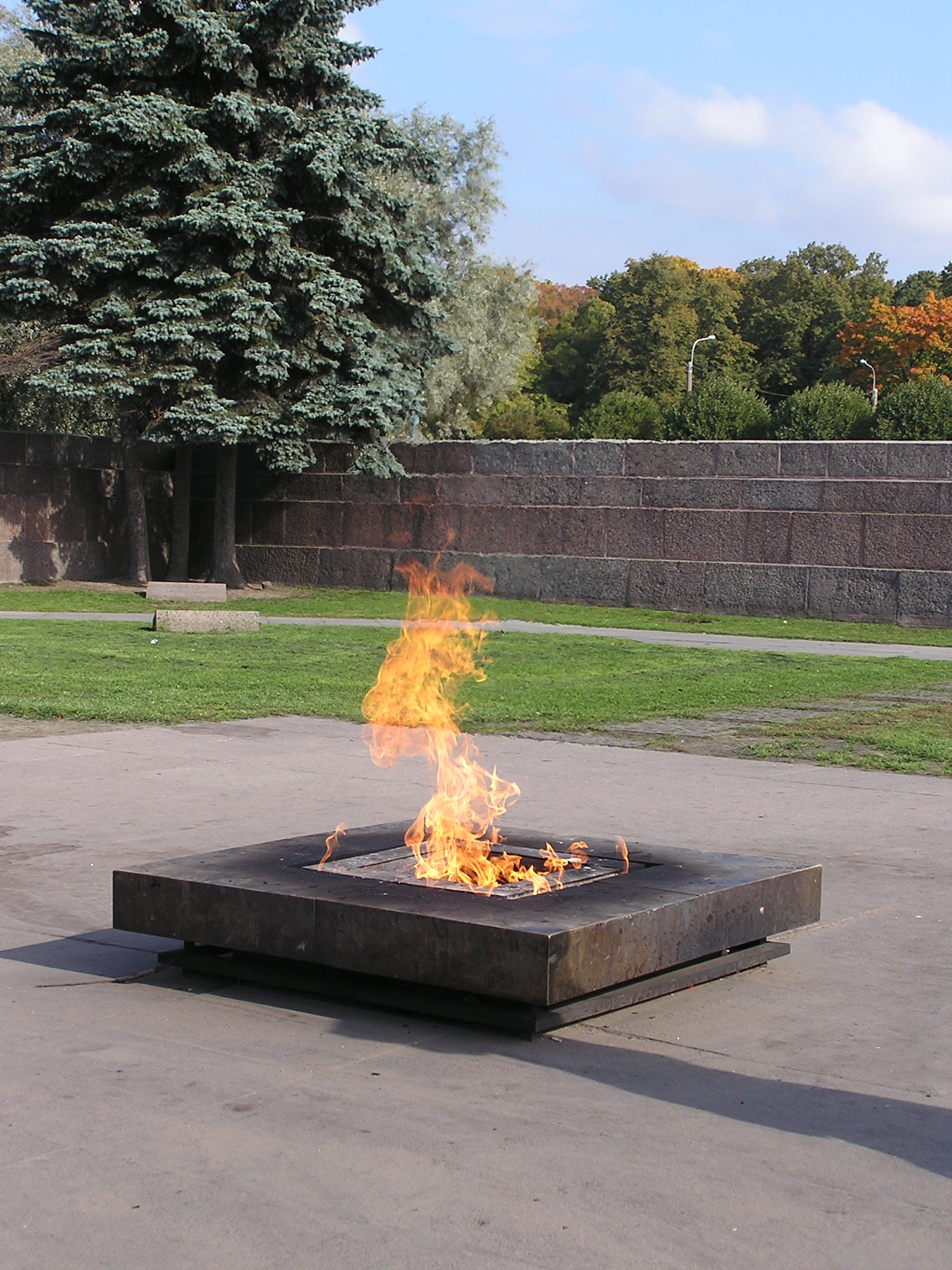 Санкт-Петербург.